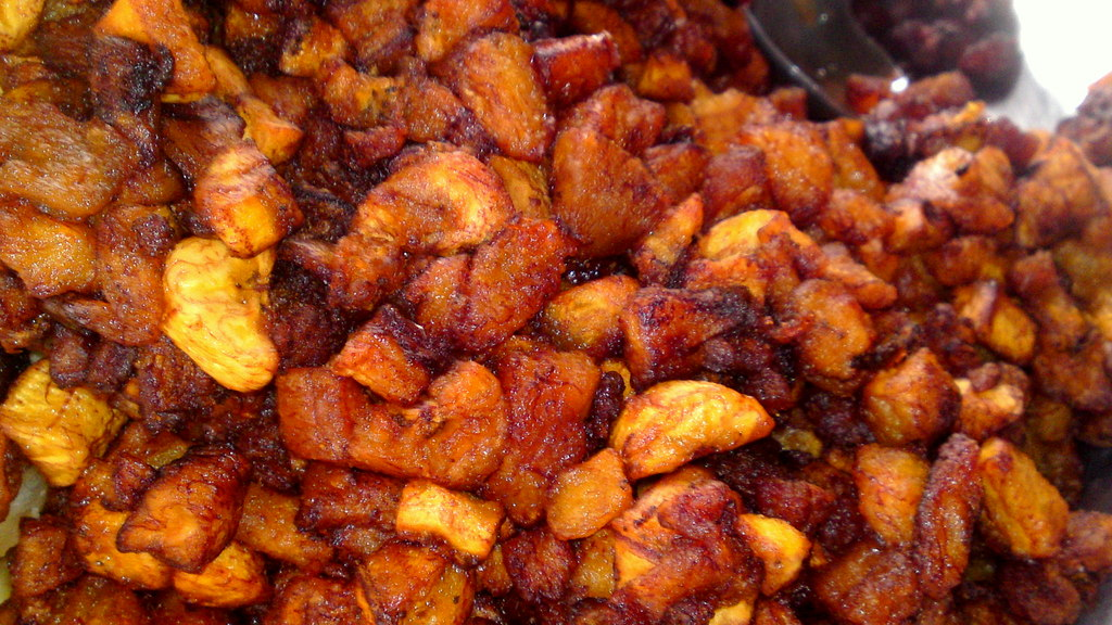 Du bon Alloko Abidjanais This is an image of food from Côte d'Ivoire